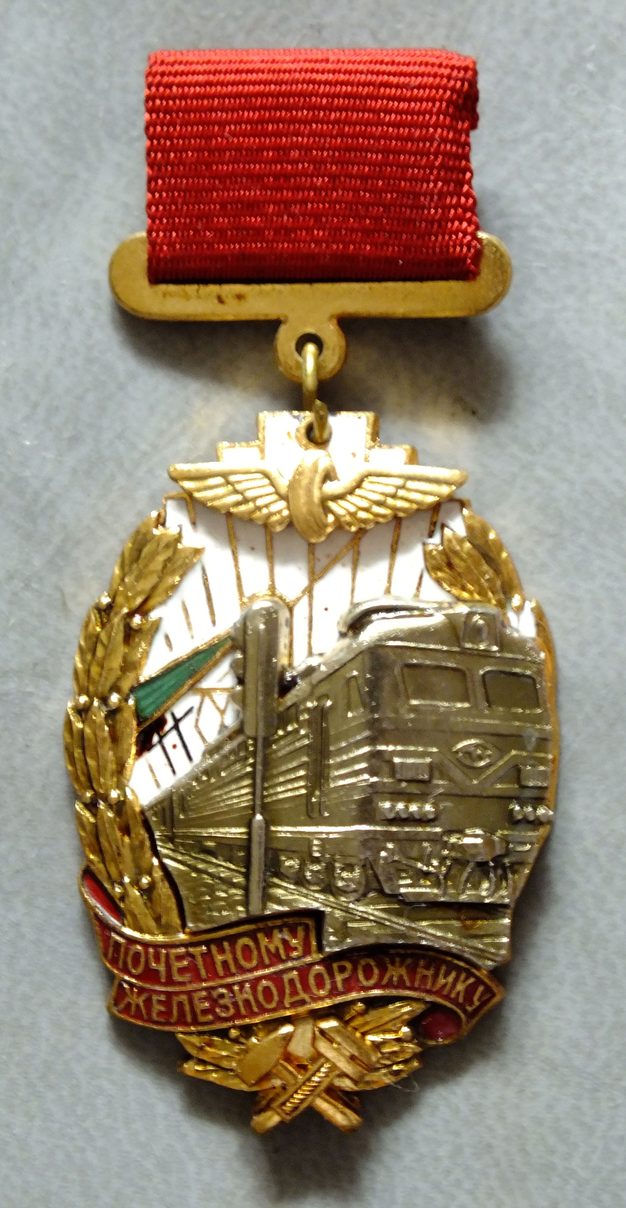 Знак Почетному железнодорожнику, СССР, 1980-е - 1990-е годы